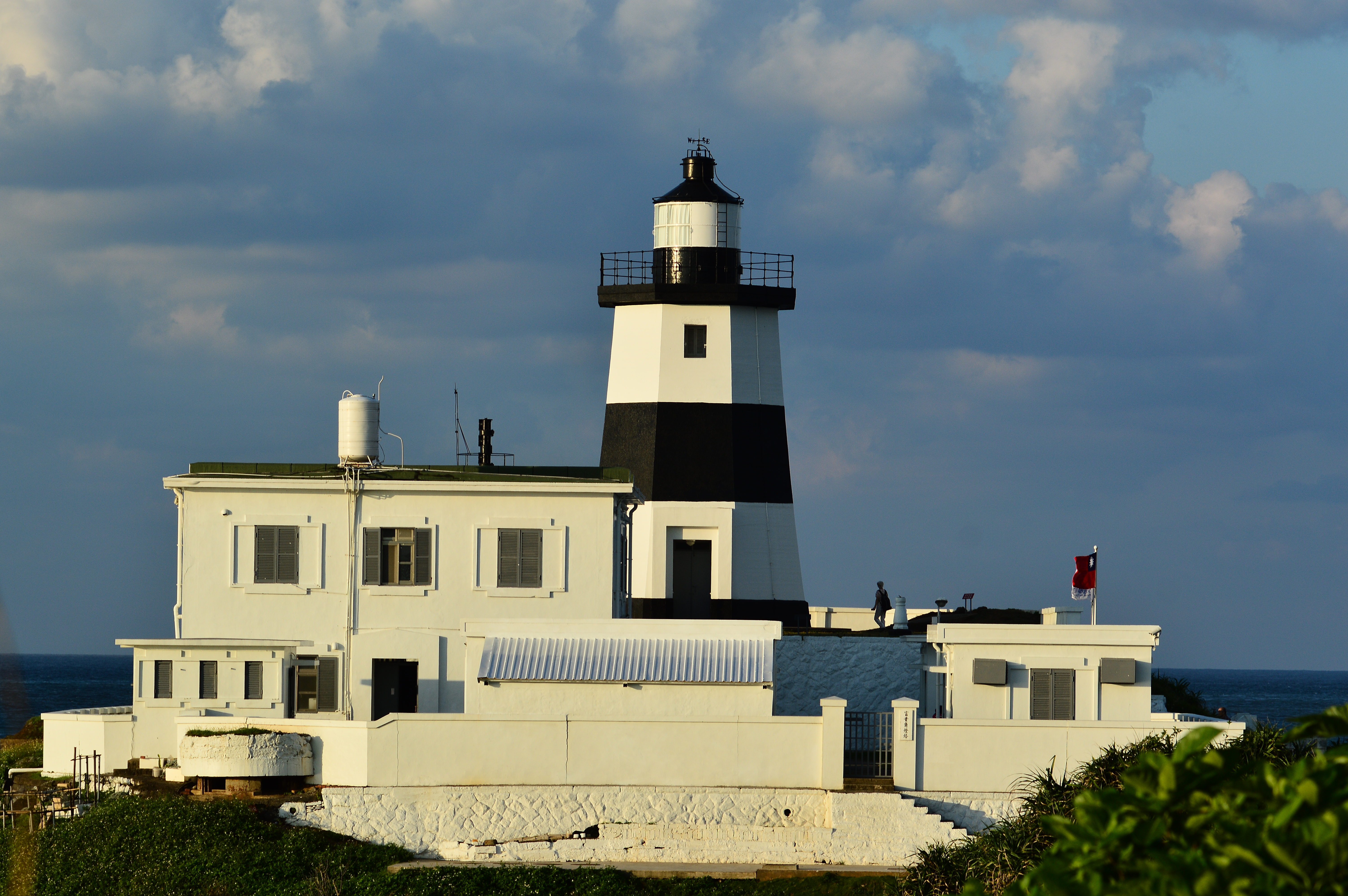 中文（台灣）: 富貴角燈塔。